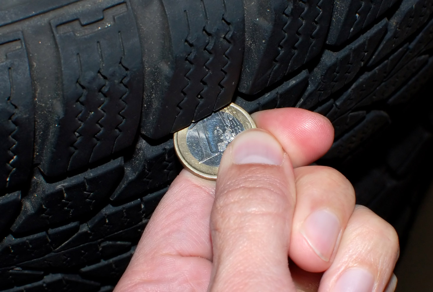 Reifenprüfung mit einer Ein-Euro-Münze. Weitergabe unter Nennung der Quelle FotoWelt